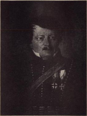 Oberst Niels Schiøtt.